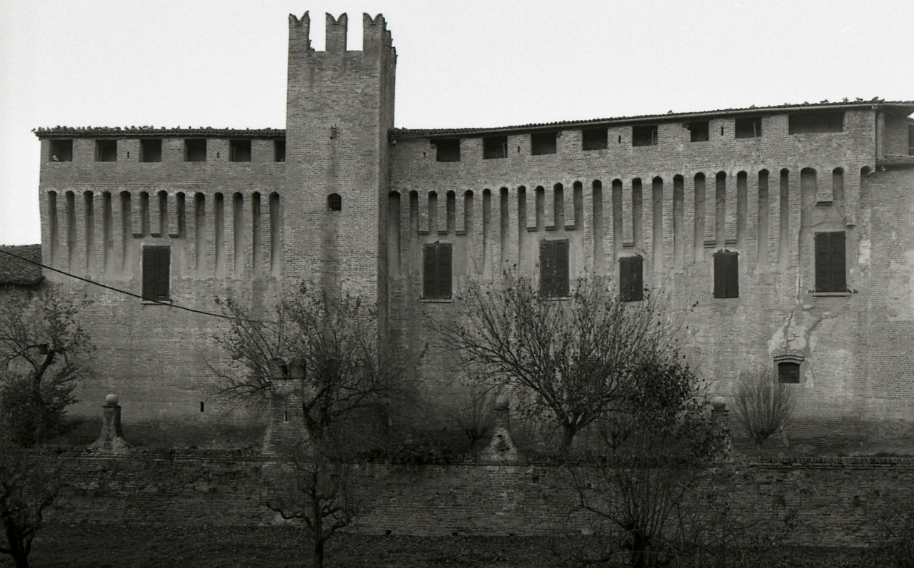 Servizio fotografico : Maccastorna, 1980 / Paolo Monti. - Strisce: 3, Fotogrammi complessivi: 12 : Negativo b/n, gelatina bromuro d'argento/ pellicola ; 35 mm. - ((Sul portanegativi: N[I]K[MA]T FP4 e iscrizione "Castello di Maccastorna 3-14". - Occasione: Documentazione per la pubblicazione: Vincenti Antonello, "Castelli viscontei e sforzeschi", Milano, Rusconi immagini, 1981. - Fonte: Agenda di Paolo Monti: Nikon Leika 3001-/ Monti 1978 (1978-1982), presso Archivio Paolo Monti. - Fonte: Monografia di Vincenti, Antonello: Castelli viscontei e sforzeschi, Milano, Rusconi immagini (1981)